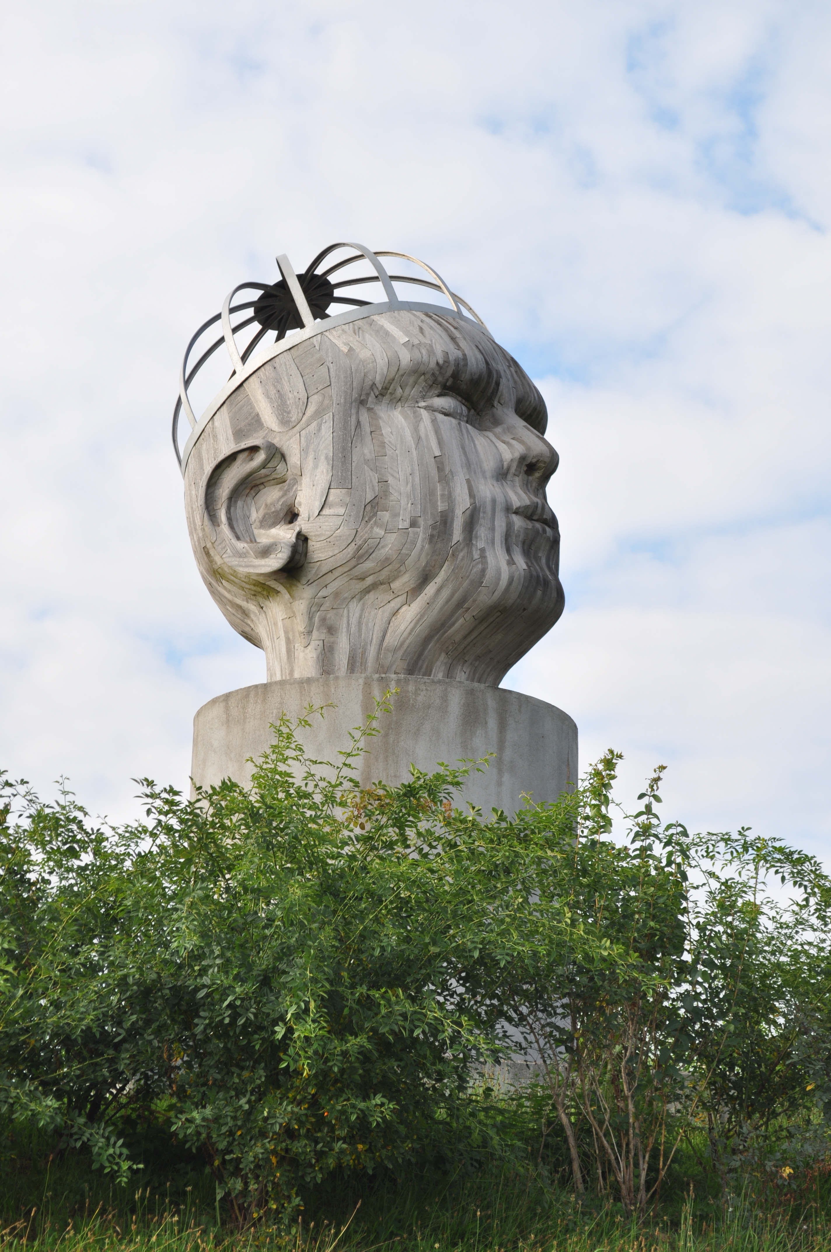 Skulptur Travel a Head von Florian Borkenhagen. Die Skulptur ist Teil der Skulpturenachse Eschborn